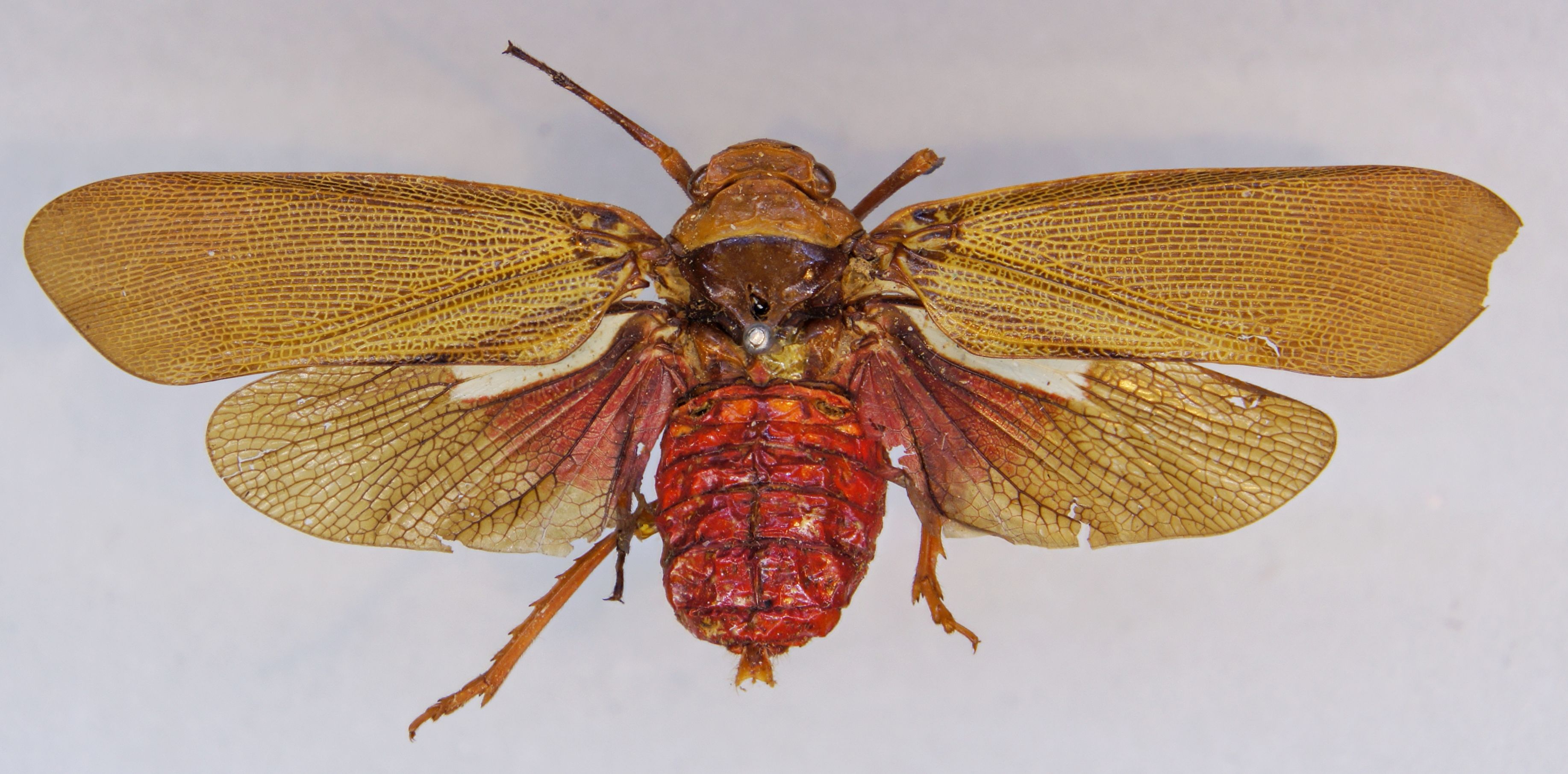 Polydictya uniformis (Walker, 1857) Herkunft: Assam